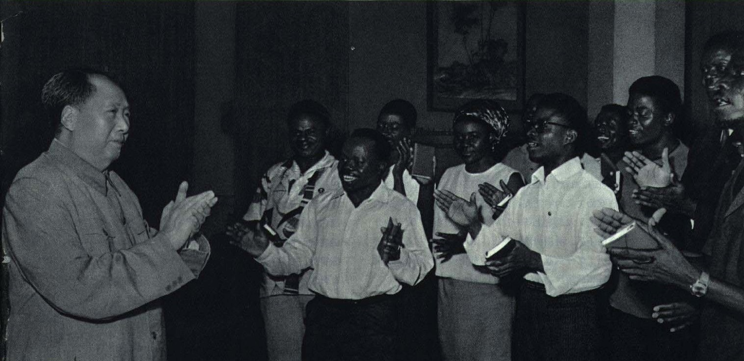 1967-09 1967年 毛泽东会见刚果留学生